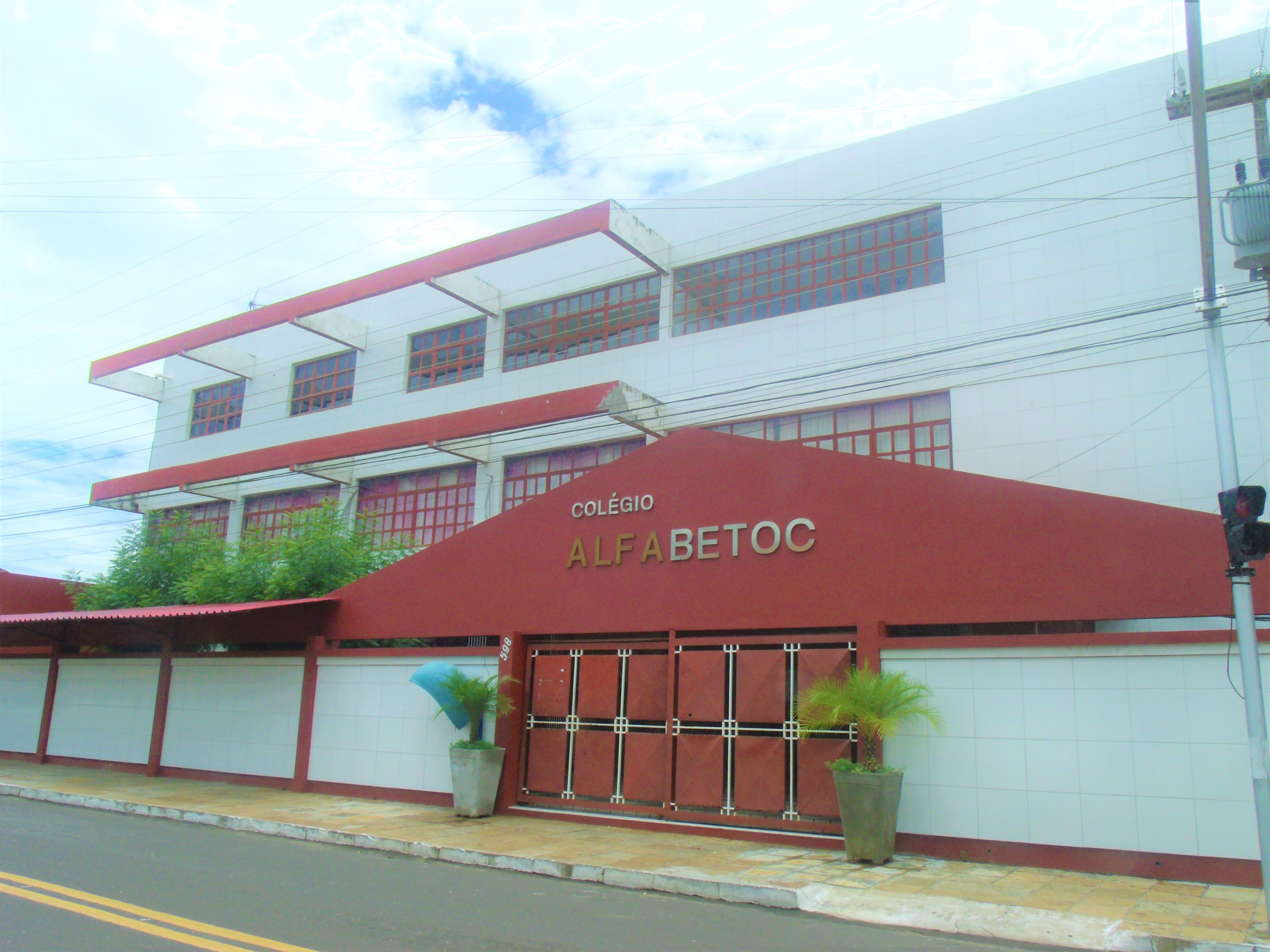 Frente do Colégio Alfabetoc, em Campo Maior, Piauí, Brasil.